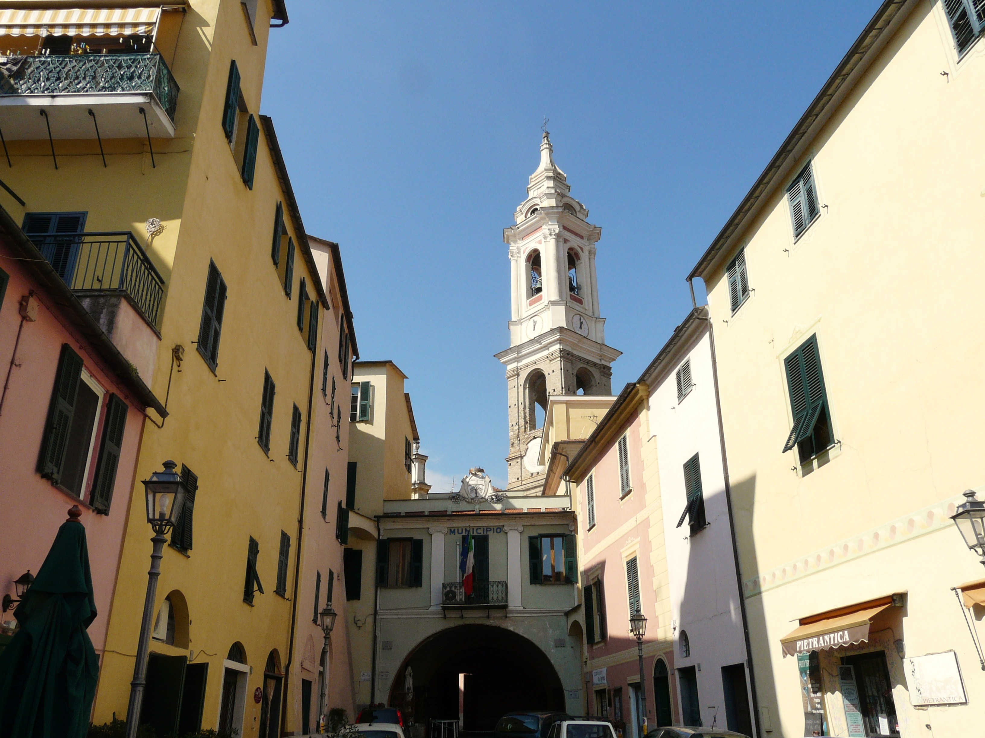 Dolcedo, Liguria, Italia